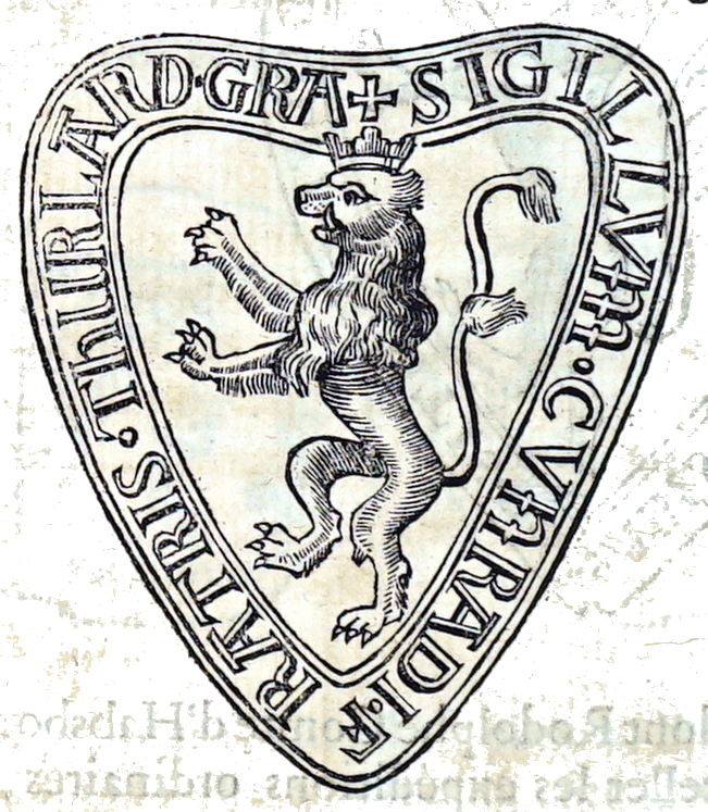 issu de "nouveau traité de diplomatique...".